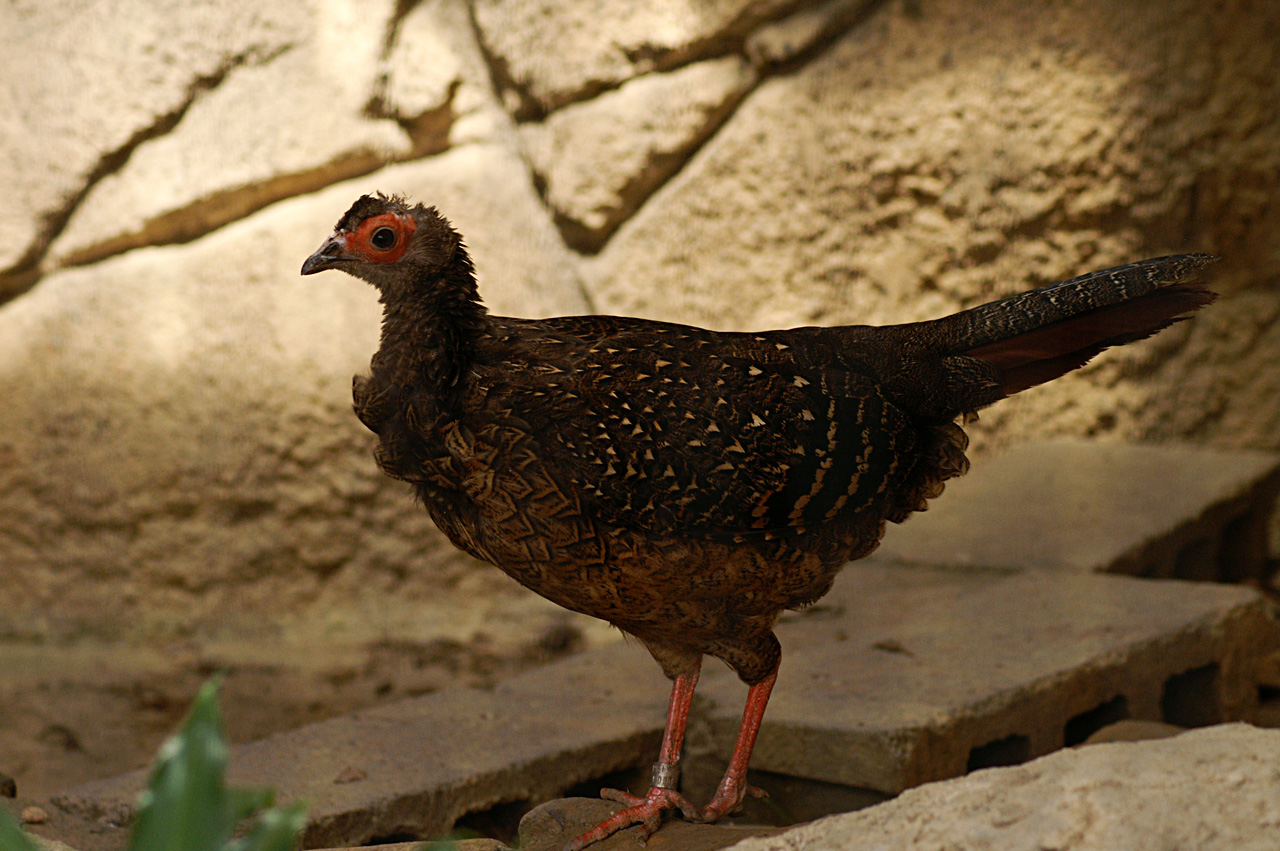 藍腹鷴雌鳥 Lophura swinhoii Bân-lâm-gú: Huâ-ke(Lophura swinhoii) ke-bó. 華雞（Lophura swinhoii）雞母。